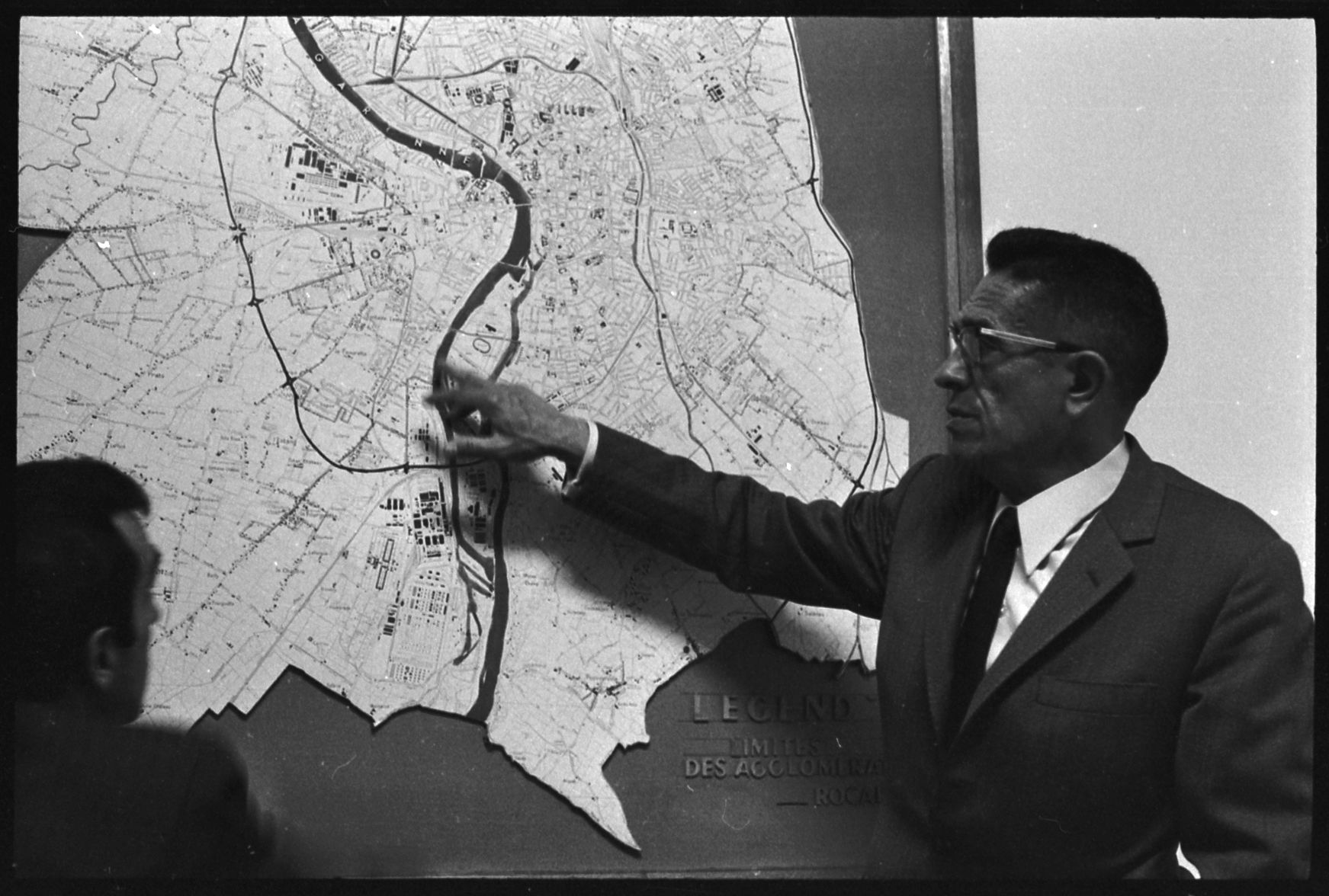 Pas de lieu. 9 Juin 1969. Vue d'une personne devant un plan de la ville de Toulouse.